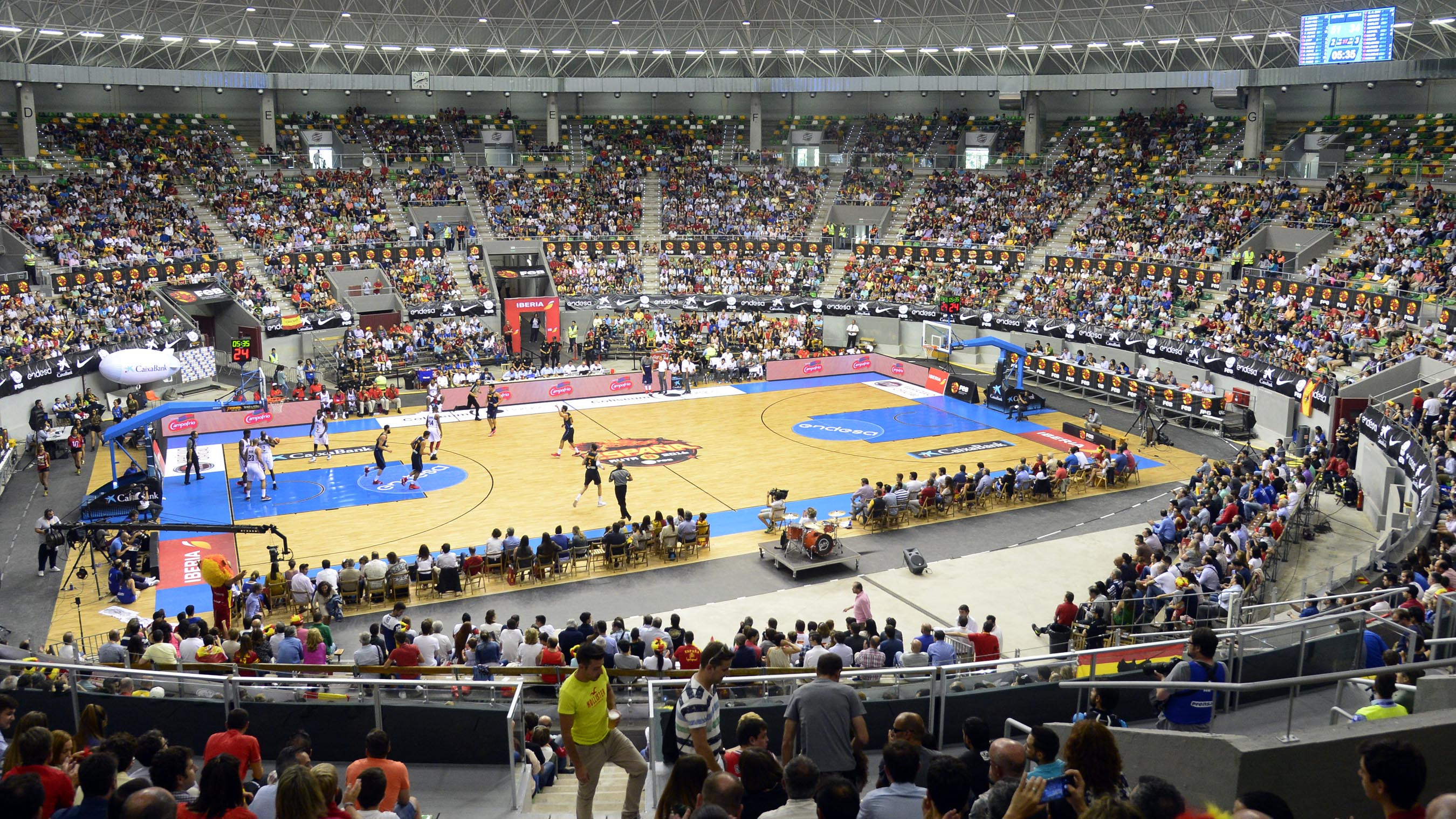 Cancha CB Miraflores Burgos